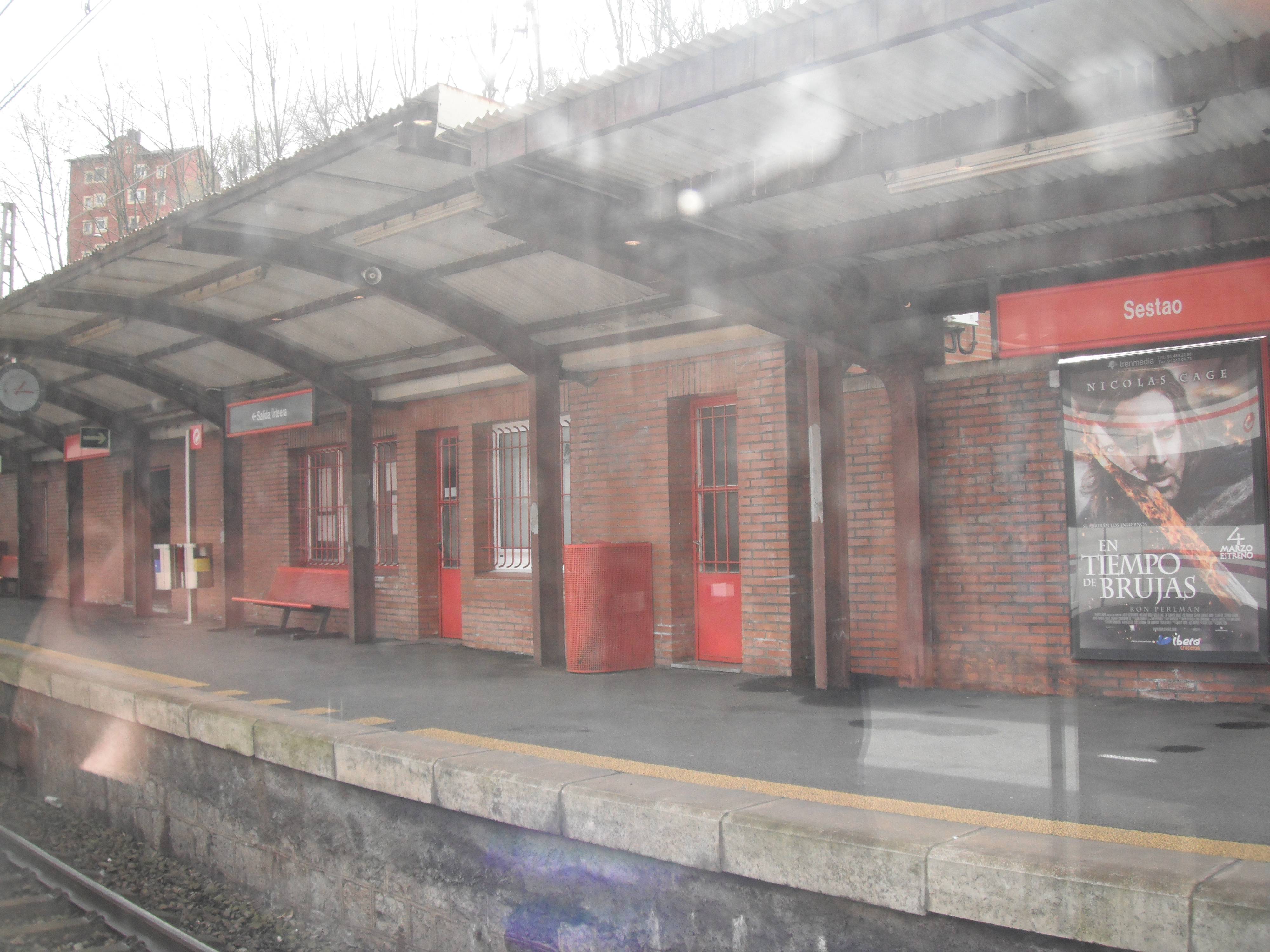 estación Cercanías Sestao